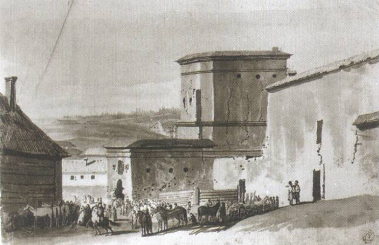 Rūdininkai gate, Vilnius, Lithuania